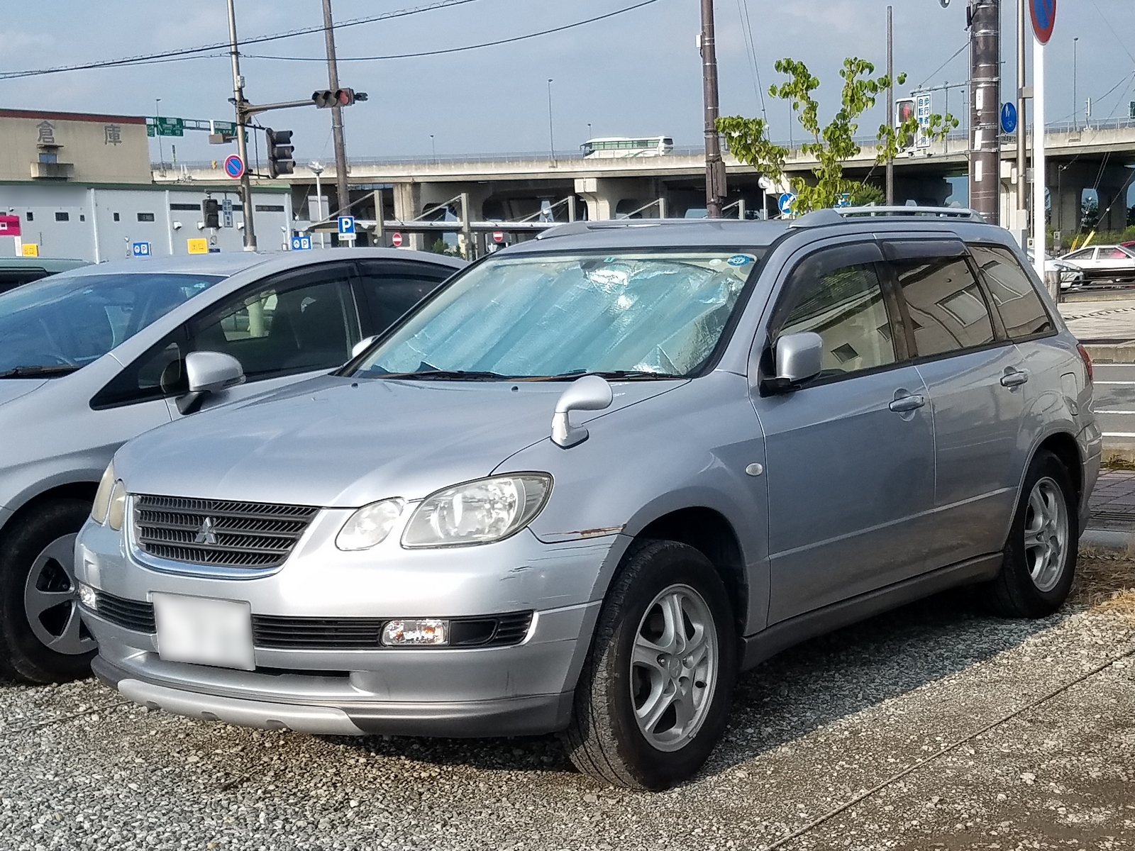 エアトレック フィールドギア（前期型）